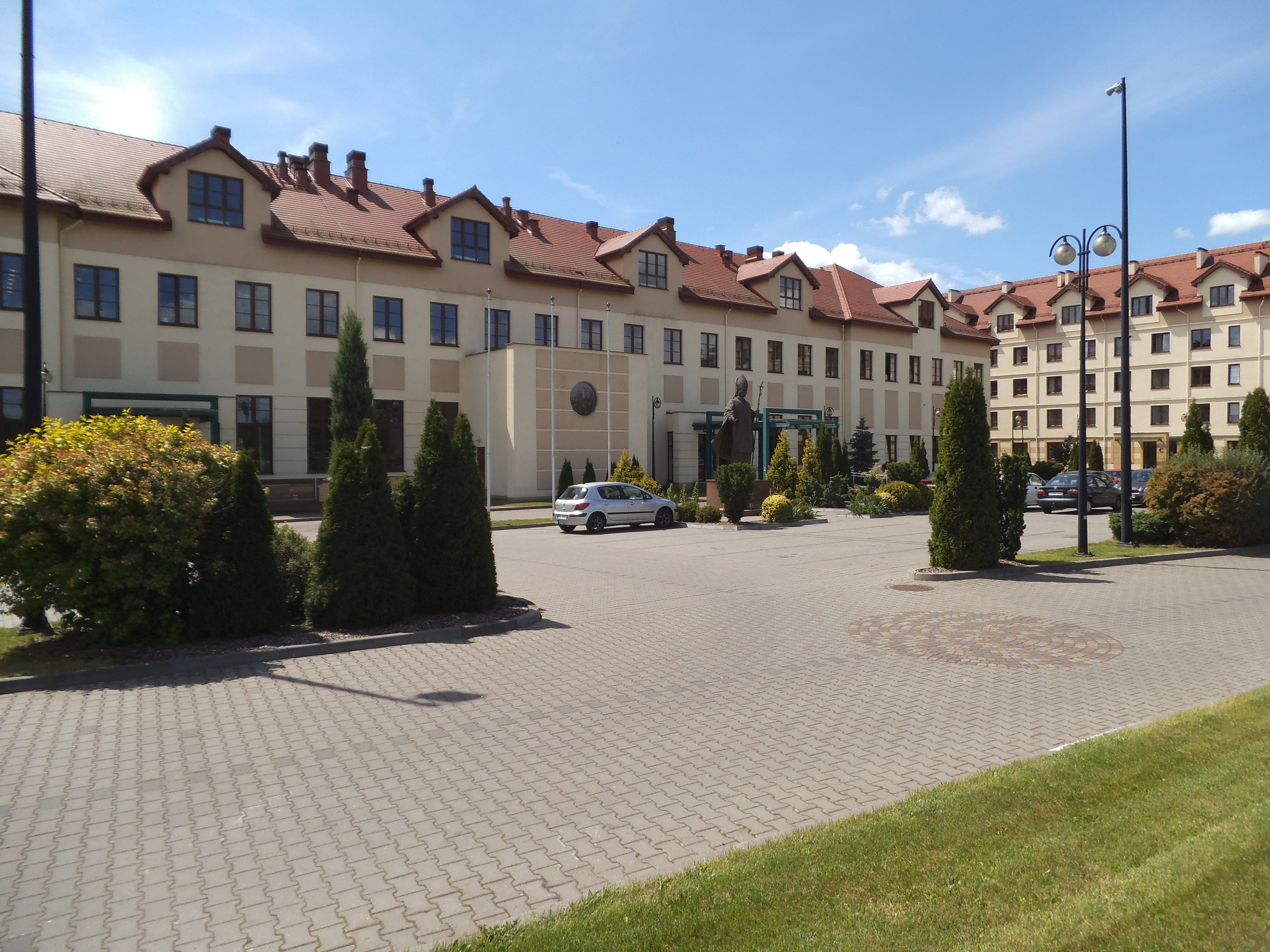 WSKSiM w Toruniu7